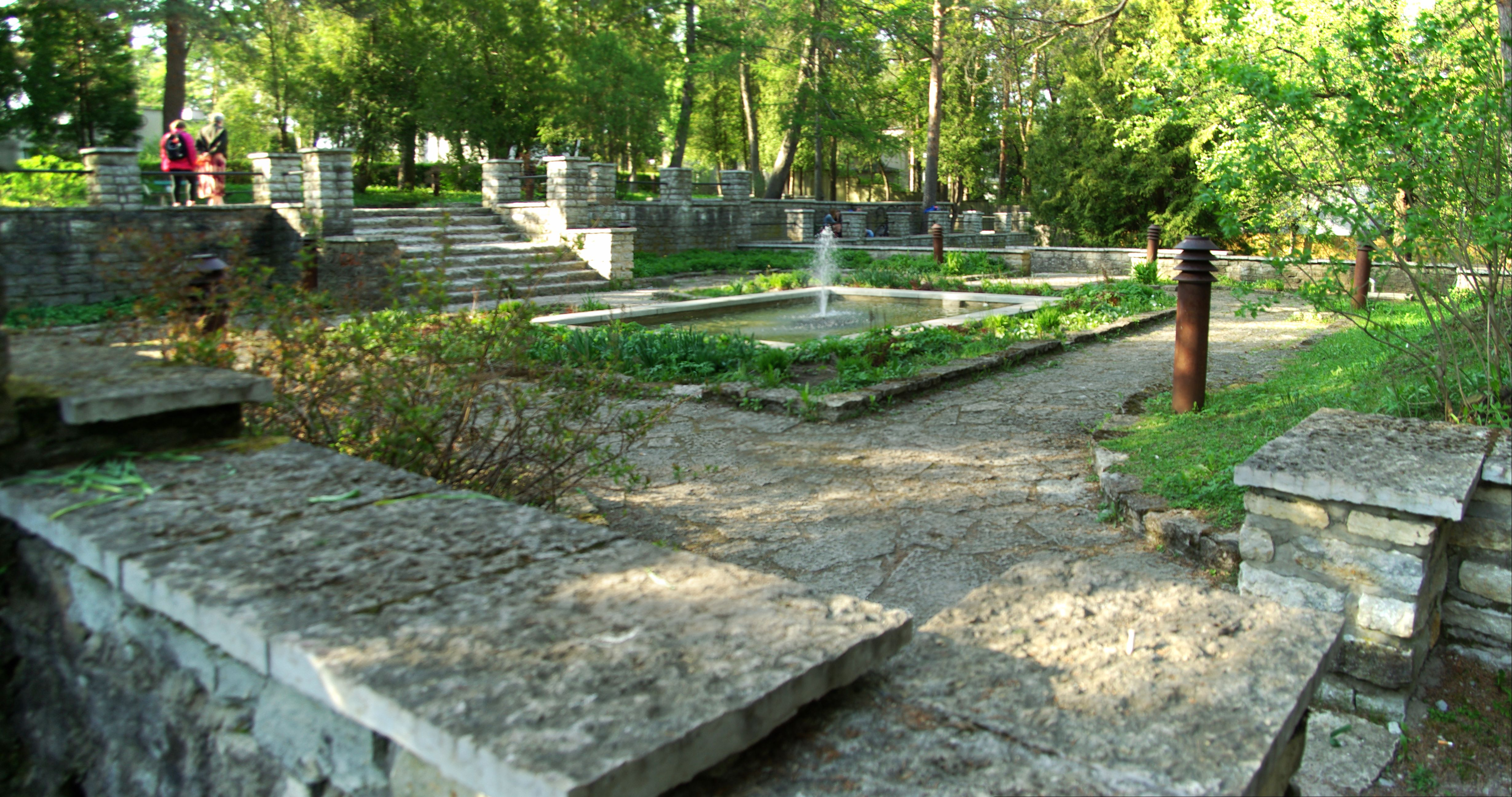 Ravila tänava park